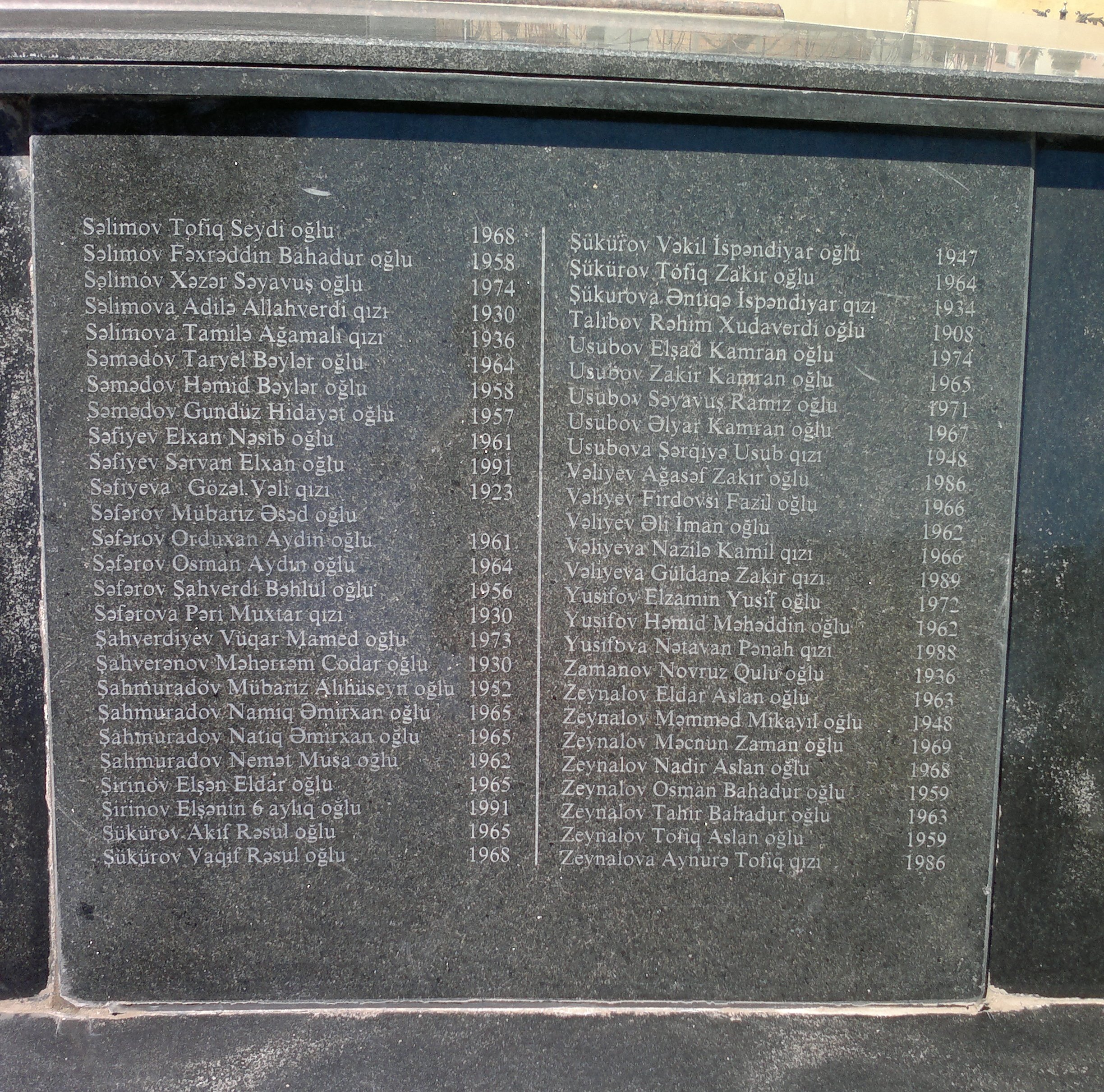 Фрагмент постамента памятника жертвам Ходжалинской резни в Баку с именами погибших